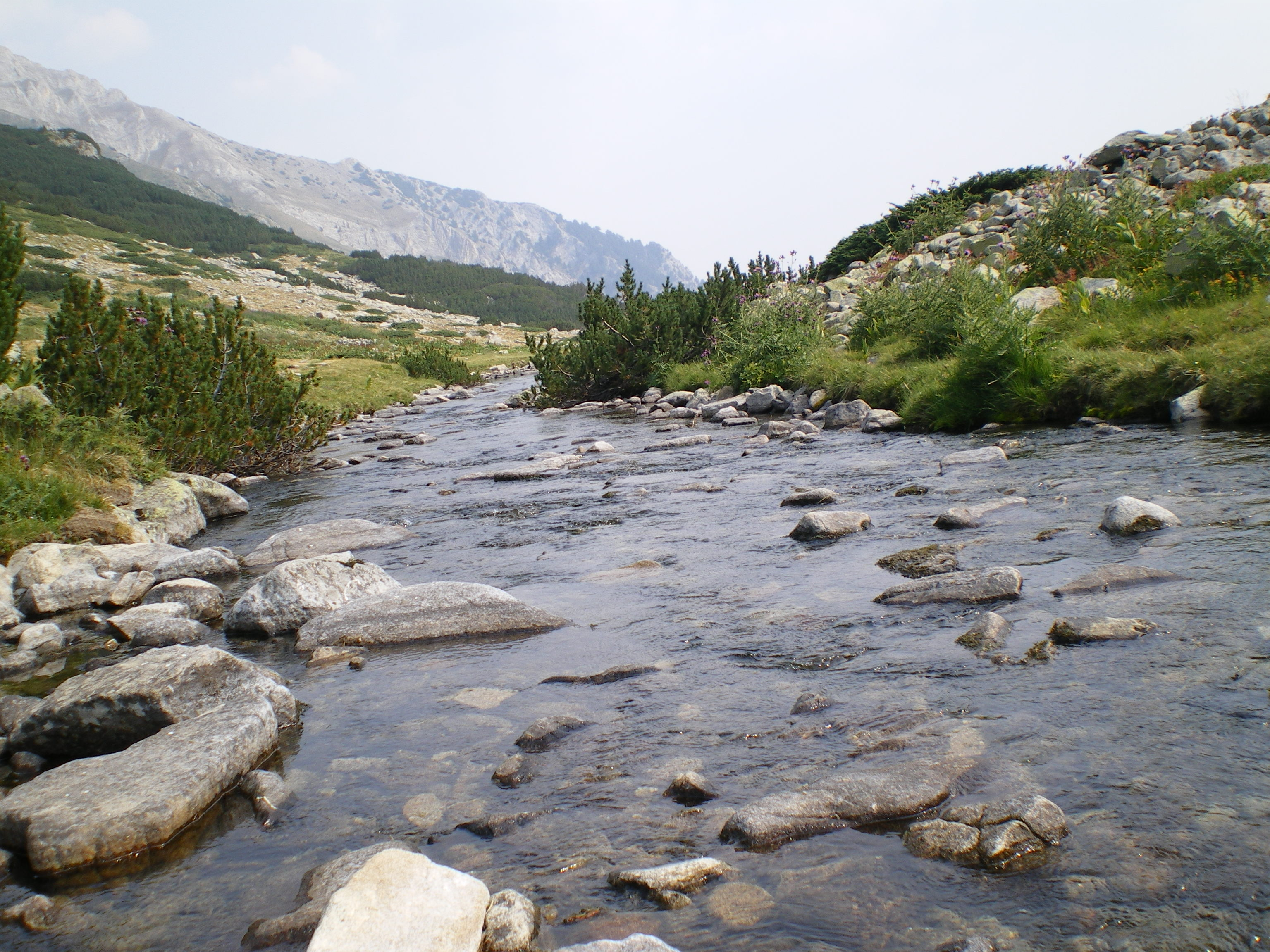 Banderica river, Pirin, Bulgaria